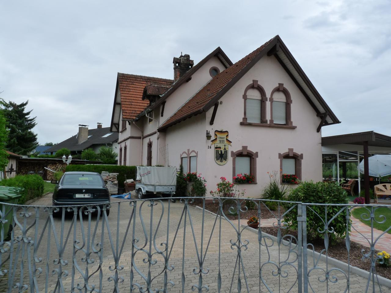 ehemaliger bahnhof in Weiler